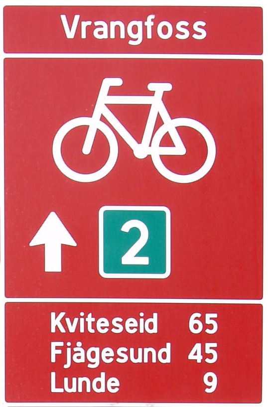 Nationale Radroute Nr. 2 in Norwegen (Schild in Vrangfoss)